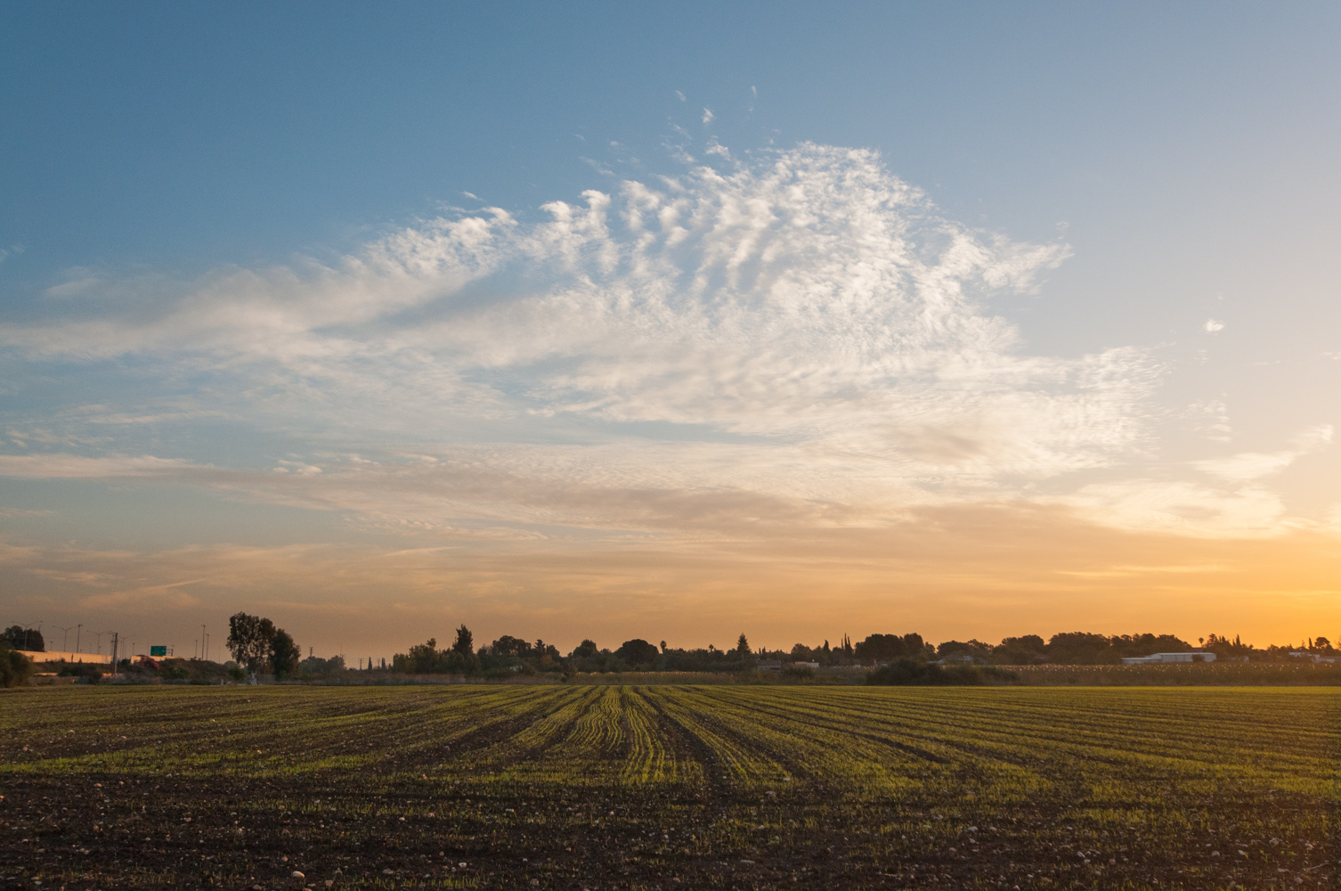 cloud Israel